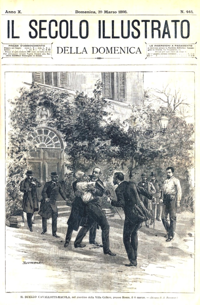 Duell zwischen den Abgeordneten Felice Cavallotti und Ferruccio Macola am 6. März 1898 in einer zeitgenösssichen Lithographie, Titelseite der Zeitung "Il Secolo illustrato" vom 20. März1898